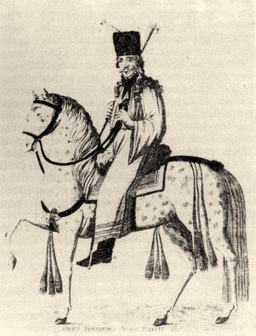 1805-ből való metszet, amely a „híres nevezetes Angyal Bandi”-t ábrázolja